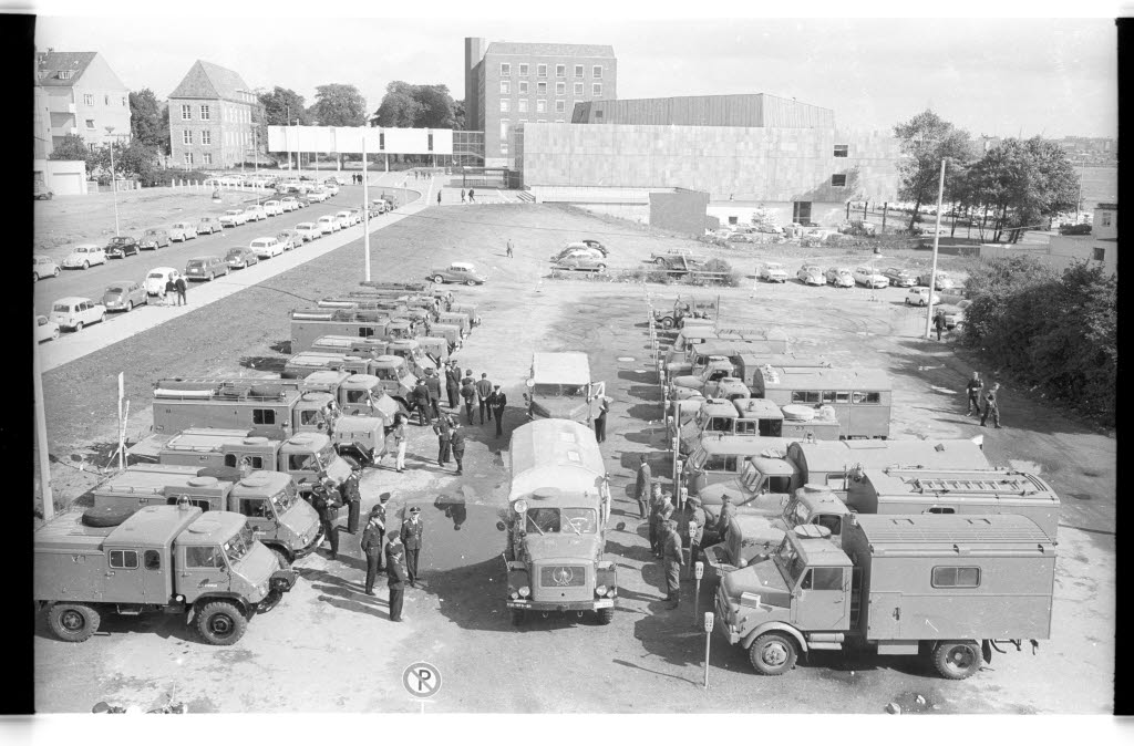 Fahrzeuge des Brandschutz-, Fernmelde-, Sanitäts-, Bergungs- und ABC-Dienstes an der Eggerstedtstraße. Im Hintergrund Konzertsaal und Schloss.